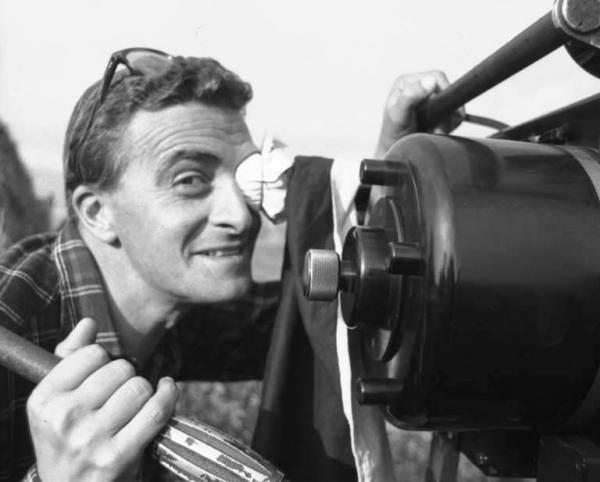 Il regista Giuseppe De Santis, fotografato in una pausa delle riprese del film "Giorni d'amore" Licensing De Santis, Giuseppe